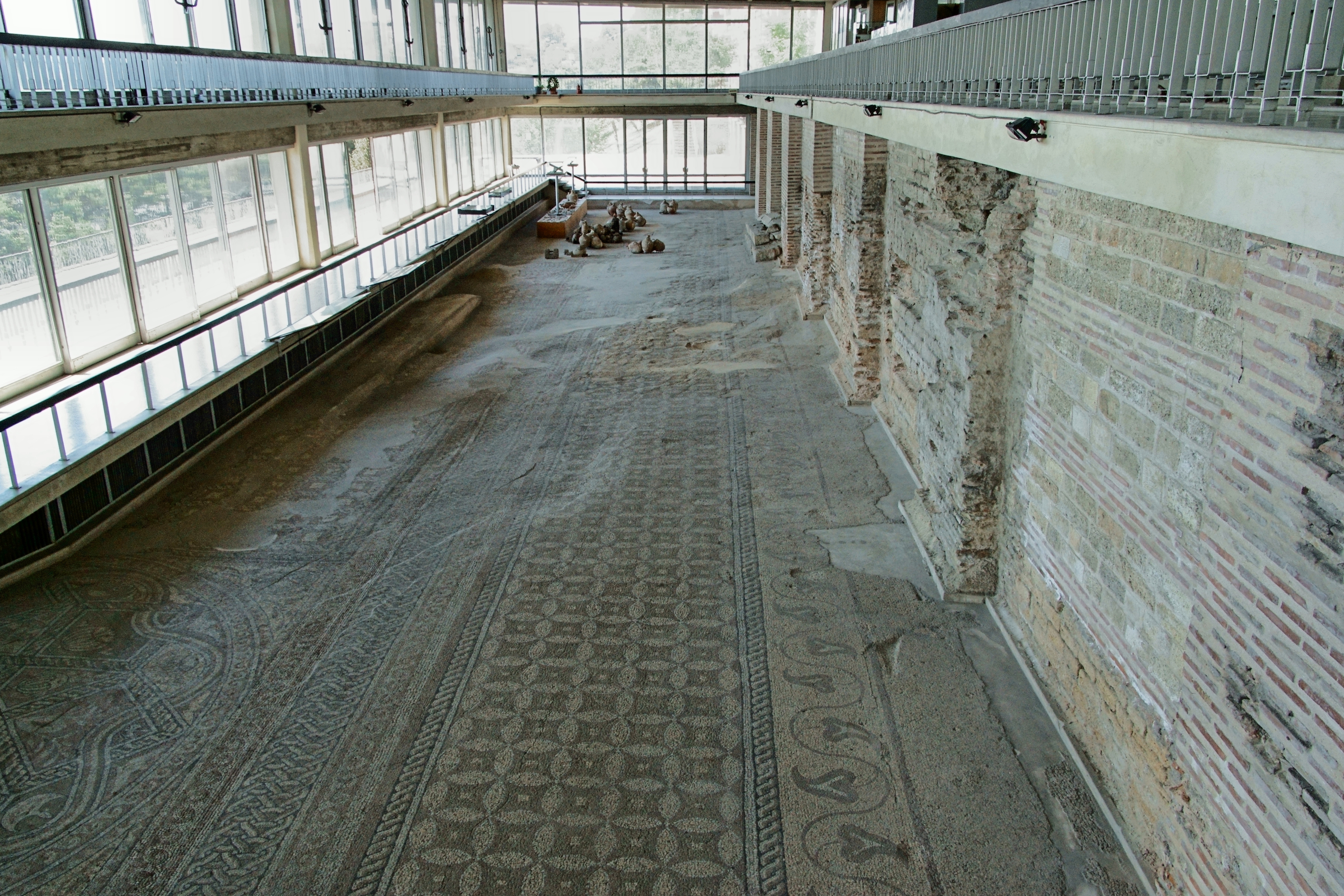 General view of the mosaic floor.